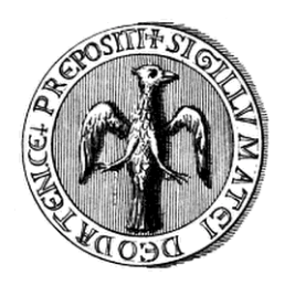 Mathieu était le fils cadet du duc de Lorraine Ferry Ier.